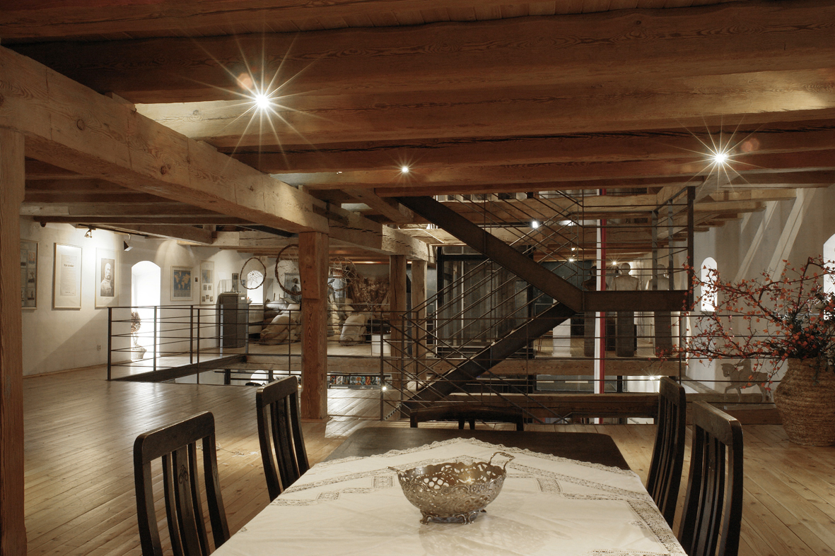 Interiér muzea T. G. Masaryka v Lánech - 1. patro